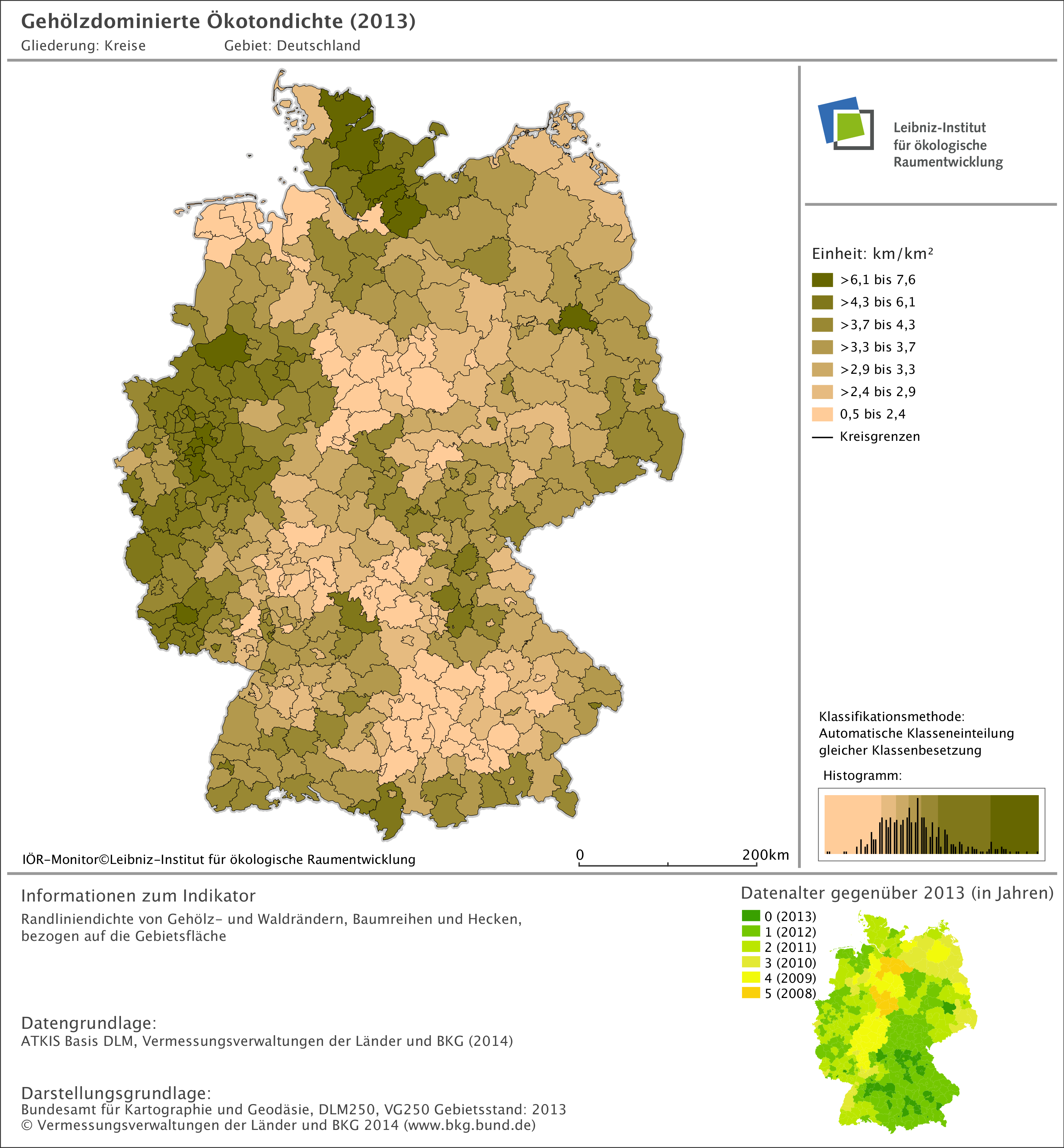 Randliniendichte von Gehölz- und Waldrändern, Baumreihen und Hecken, bezogen auf die Gebietsfläche Bedeutung und Interpretation: Als Ökoton (Saum- oder Randbiotop) ist in der Ökologie ein besonders artenreicher Übergangsbereich zwischen zwei verschiedenen Ökosystemen zu verstehen. Dabei spielen Gehölz- und Waldränder, Baumreihen und Hecken eine wichtige Rolle. Je mehr Saumbiotope es in einer Landschaft bzw. Gebietseinheit gibt, desto höher ist diese Landschaft aus naturschutzfachlicher Sicht zu bewerten. Datengrundlagen: ATKIS Basis-DLM, BKG Methodik: Quotient aus der gesamten Randlinienlänge von Gehölz- und Waldrändern, Baumreihen und Hecken einerseits und der Gebietsfläche (aus dem ATKIS Basis-DLM abgeleitete Fläche der Gebietseinheit der entsprechenden Bezugsebene) andererseits. Es werden die Längen der im Basis-DLM dargestellten äußeren Ränder von Waldflächen und Gehölzen sowie der linienhaft erfassten Baumreihen, Hecken und Gehölze in der Gebietseinheit aufsummiert. Dabei werden Waldränder an durchquerenden Straßen, Bahnlinien oder Gewässern nur dann berücksichtigt, wenn diese Objekte als Flächen im Basis-DLM enthalten sind. Linien direkt aneinander grenzender Waldflächen bzw. Gehölze gehen nicht in die Berechnung ein.